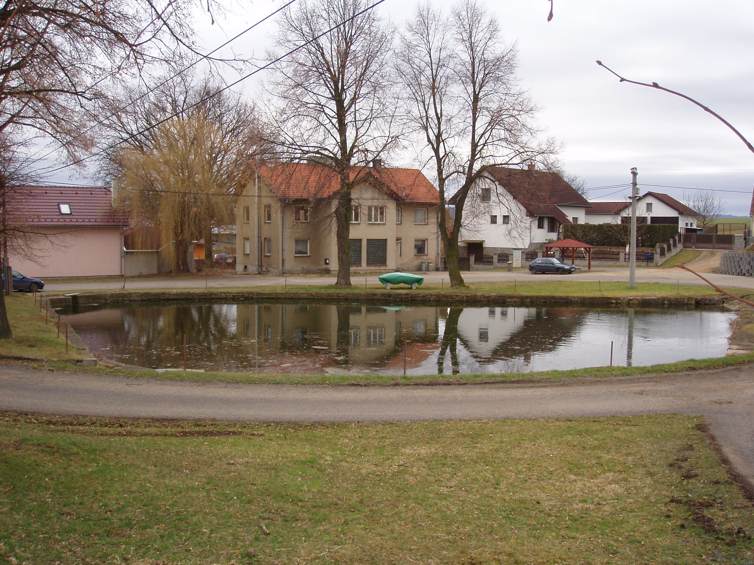 Náves v obci Druhlice